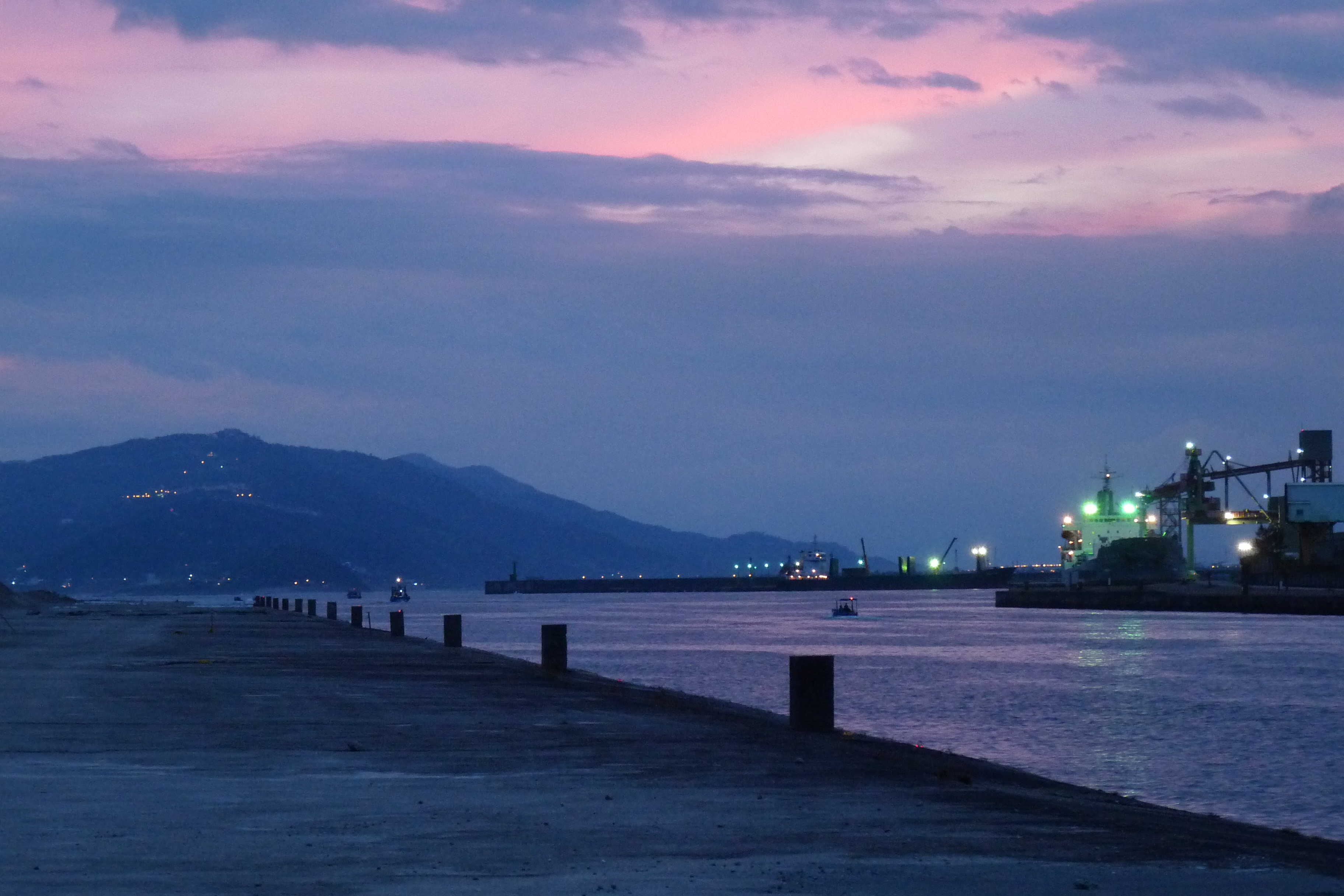 Hualien